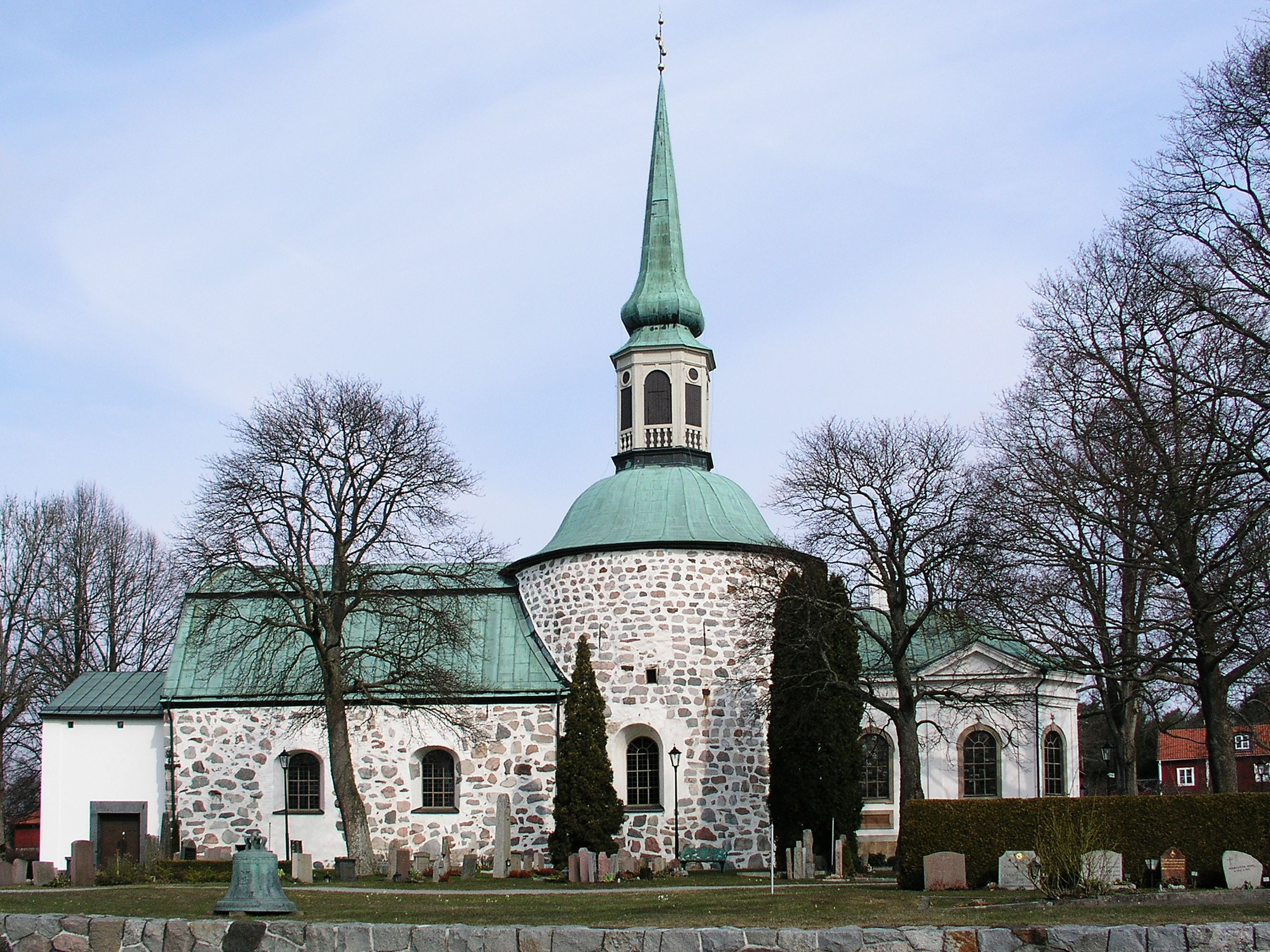 Bromma kyrka/church, Diocese of Stockholm, Sweden.